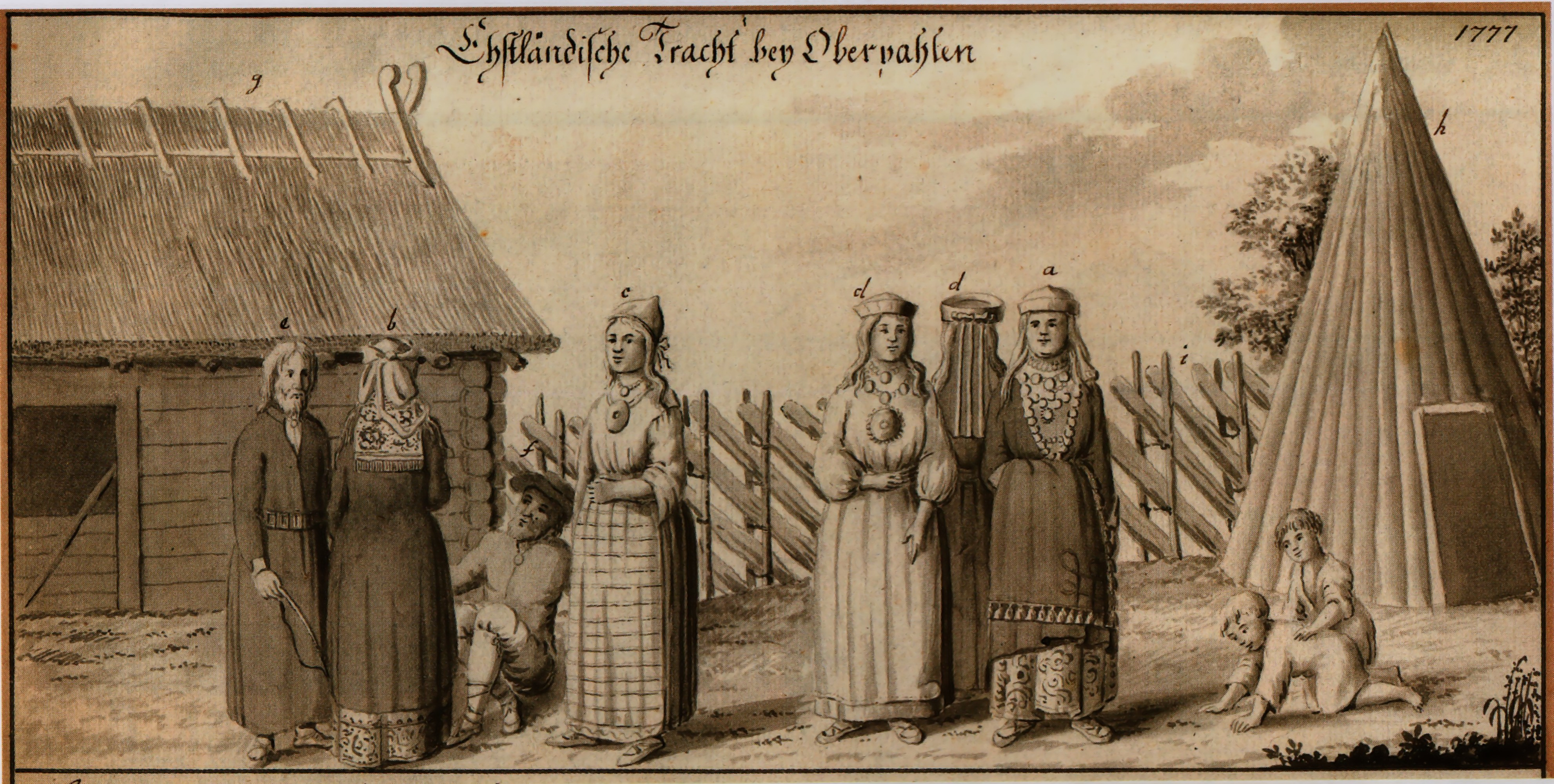 Brotze's Beschreibung: EHSTLÄNDISCHE TRACHT BEY OBERPAHLEN 1777 a Eine Ehstin vorwärts ihr Söbba auf der Hand haltend, b. Dieselbe rückwärts, c. Eine Ehstin wie sie im Hause gekleidet ist, mit der kleinen Haube d, d. Hofsmagd vor- und rückwärts, halbgekleidet, wie sie ihre Herrschaft zu bedienen pflegt. e Ehste in völliger Kleidung. f. Ein anderrer wie er Aus Hupels Topographichen Nachrichten von Lief- und Ehstland. Band II.